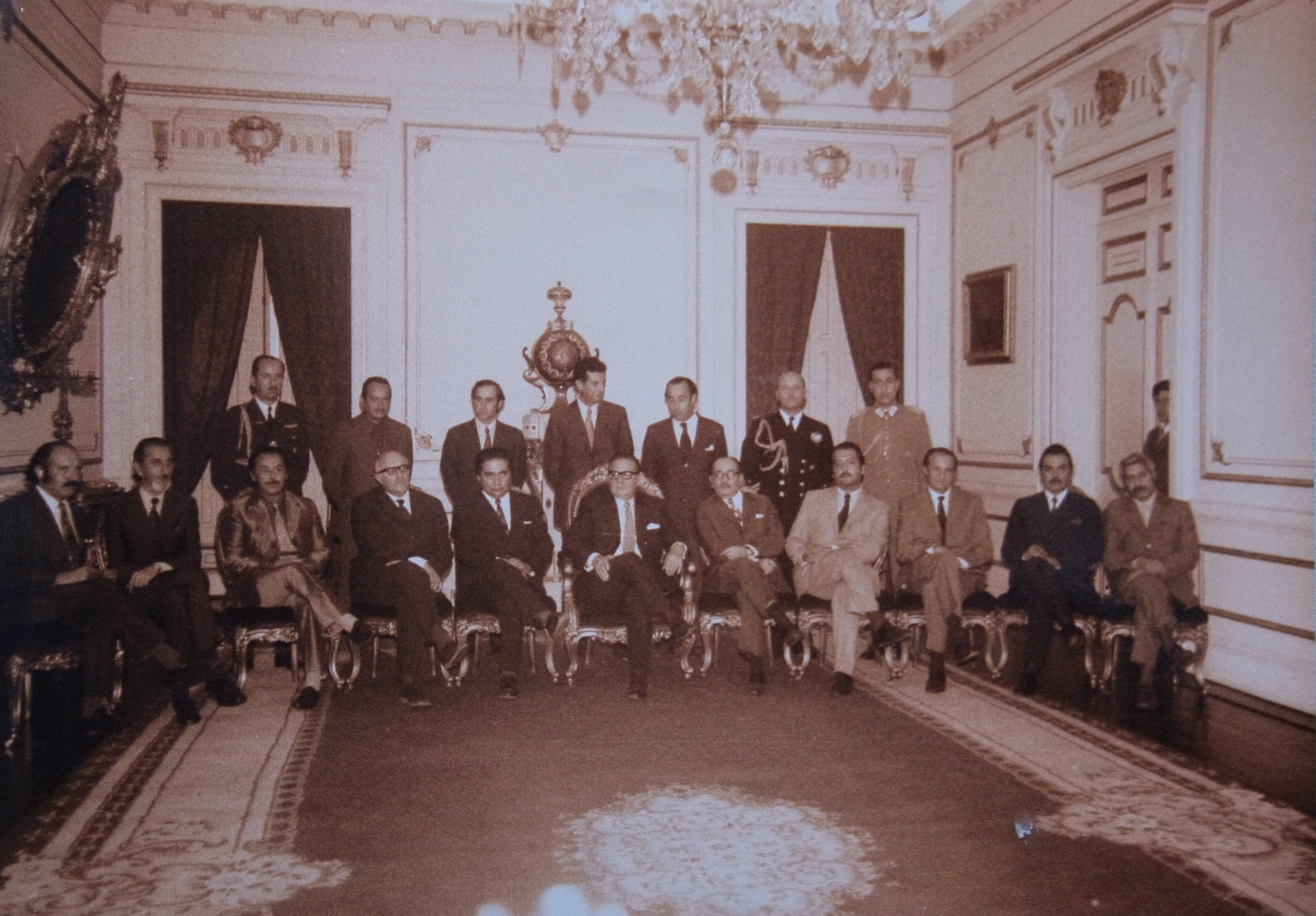 Gabinete de Salvador Allende